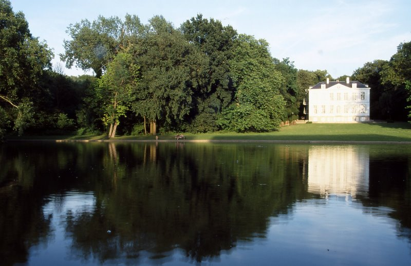 A brüsszeli Park Malou látképe a Chateau Malou-val a háttérben